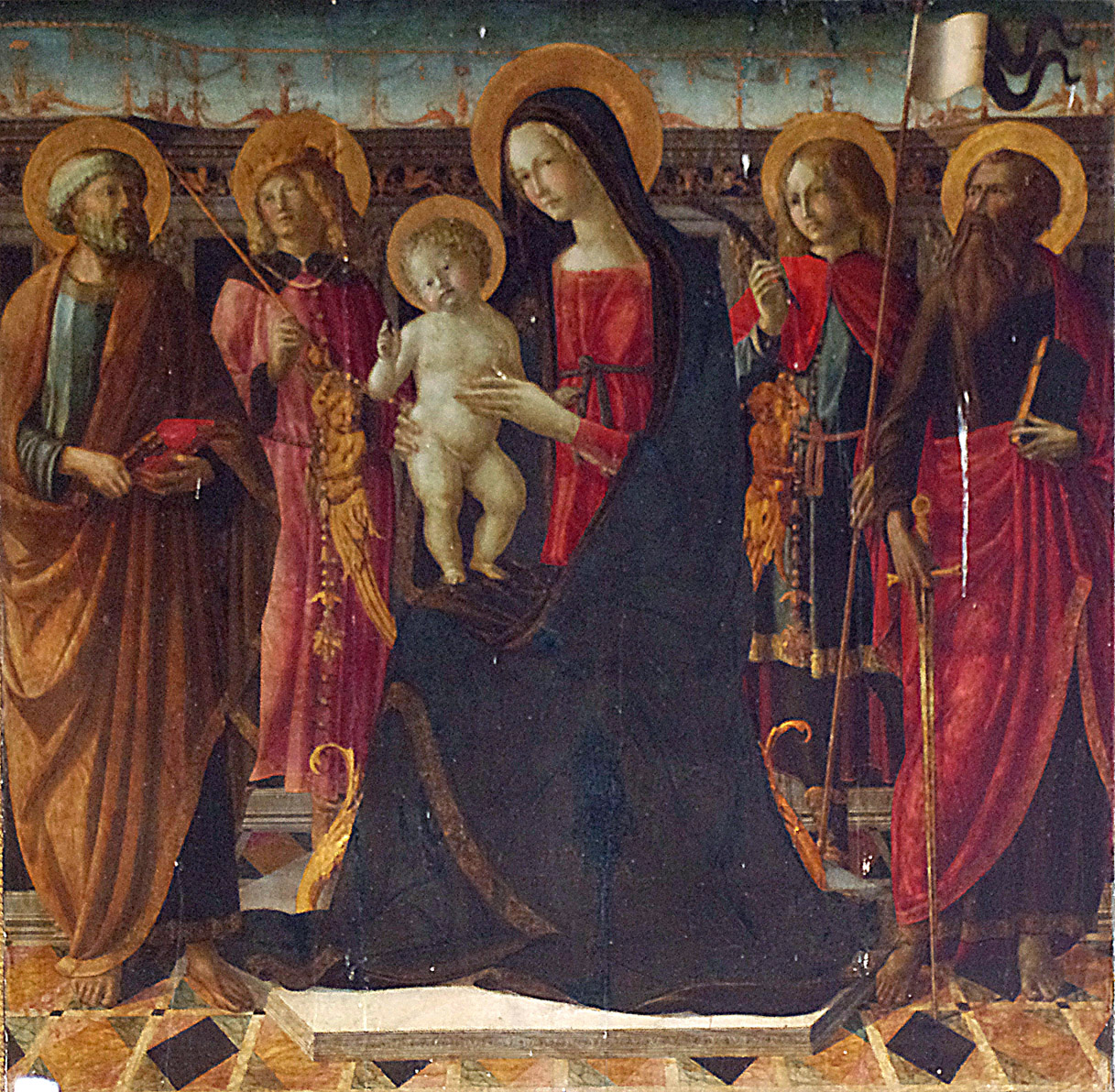 Neroccio di Bartolomeo de' Landi - Pala d'altare - Pieve della Santissima Annunziata - Montisi (SI)